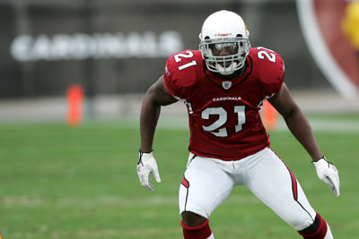 Antrel Rolle in game